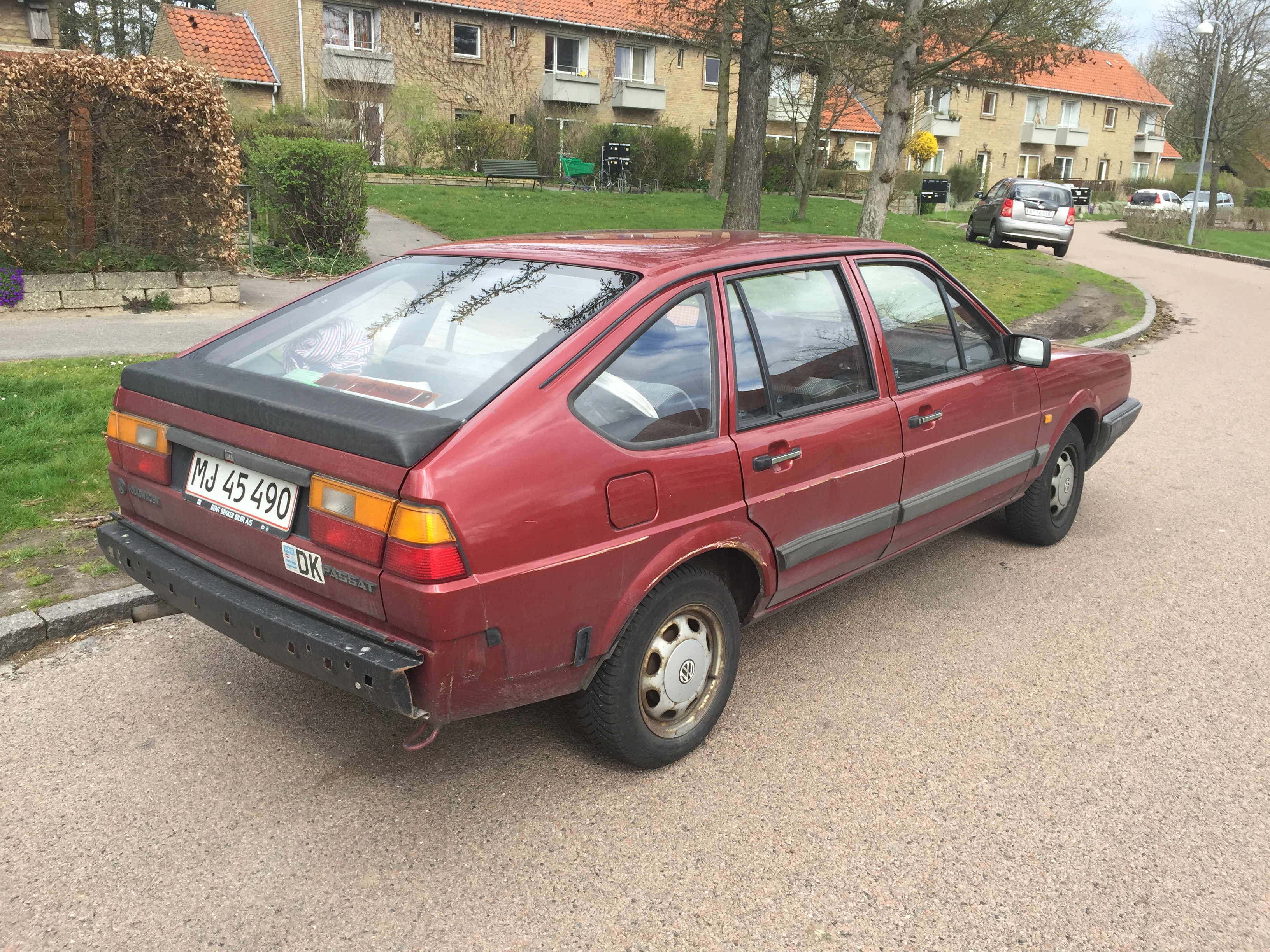 Volkswagen Passat B2